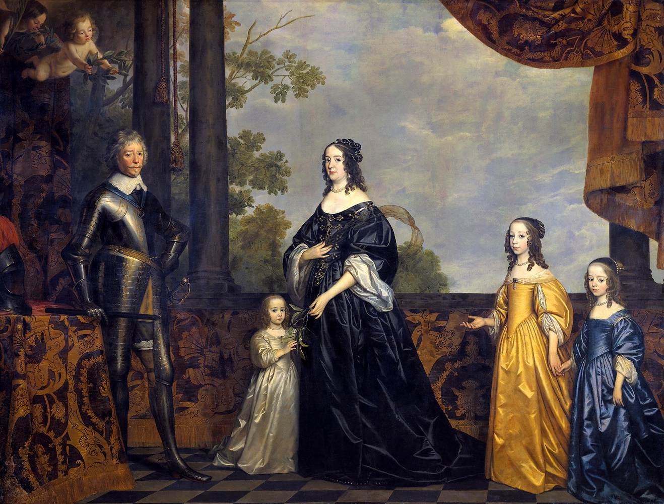 Part of a series, together with File:Gerrit van Honthorst - Portret van Friedrich Wilhelm I, keurvorst van Brandenburg (1620-1688) en zijn echtgenote Louise Henriette van Nassau (1627-1667) Rijksmuseum.jpg and File:Willem II prince of Orange and Maria Stuart-2.jpg.